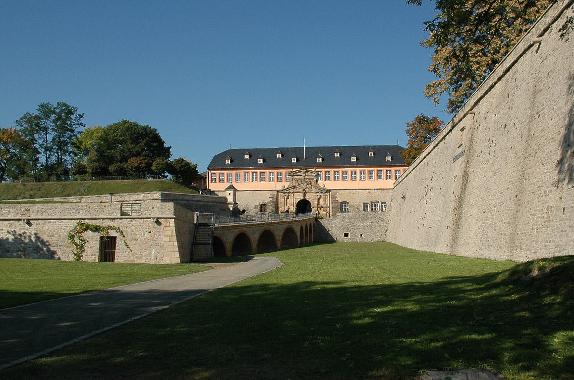 Kommandantenhaus (errichtet 1669) mit dem Peterstor (errichtet zwischen 1666 und 1668) und der Zufahrtsbrücke Peterstor (errichtet 1670) der Zitadelle Petersberg in Erfurt